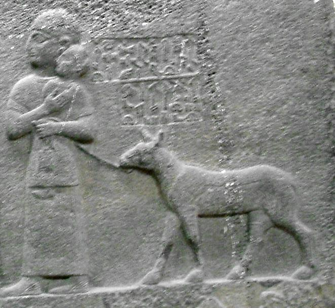 Későhettita orthosztát, Anatóliai Civilizációk Múzeuma, Ankara